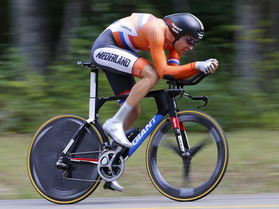 Tom Dumoulin in TT bike world championships